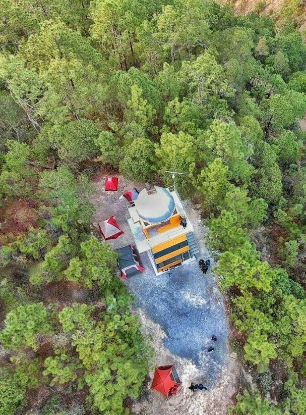 Observatorio Astronómico y Reserva Ecológica (de la UANL) en el cerro El Picacho en Iturbide